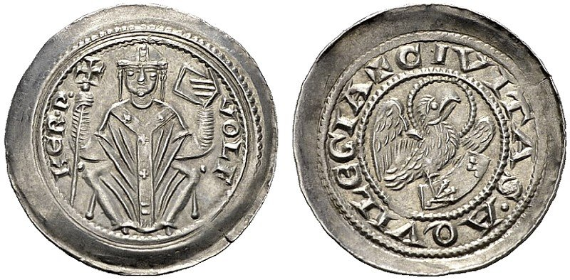 ITALIEN - Aquileia, Patriachat Volchero 1204-1218 Denaro con aquila (1209?) Av.: VOLF KER P, thronender Patriarch Rv.: CIVITAS AQVILEGIA, nimbierter Adler RR Bern:12(R5) stplfr.